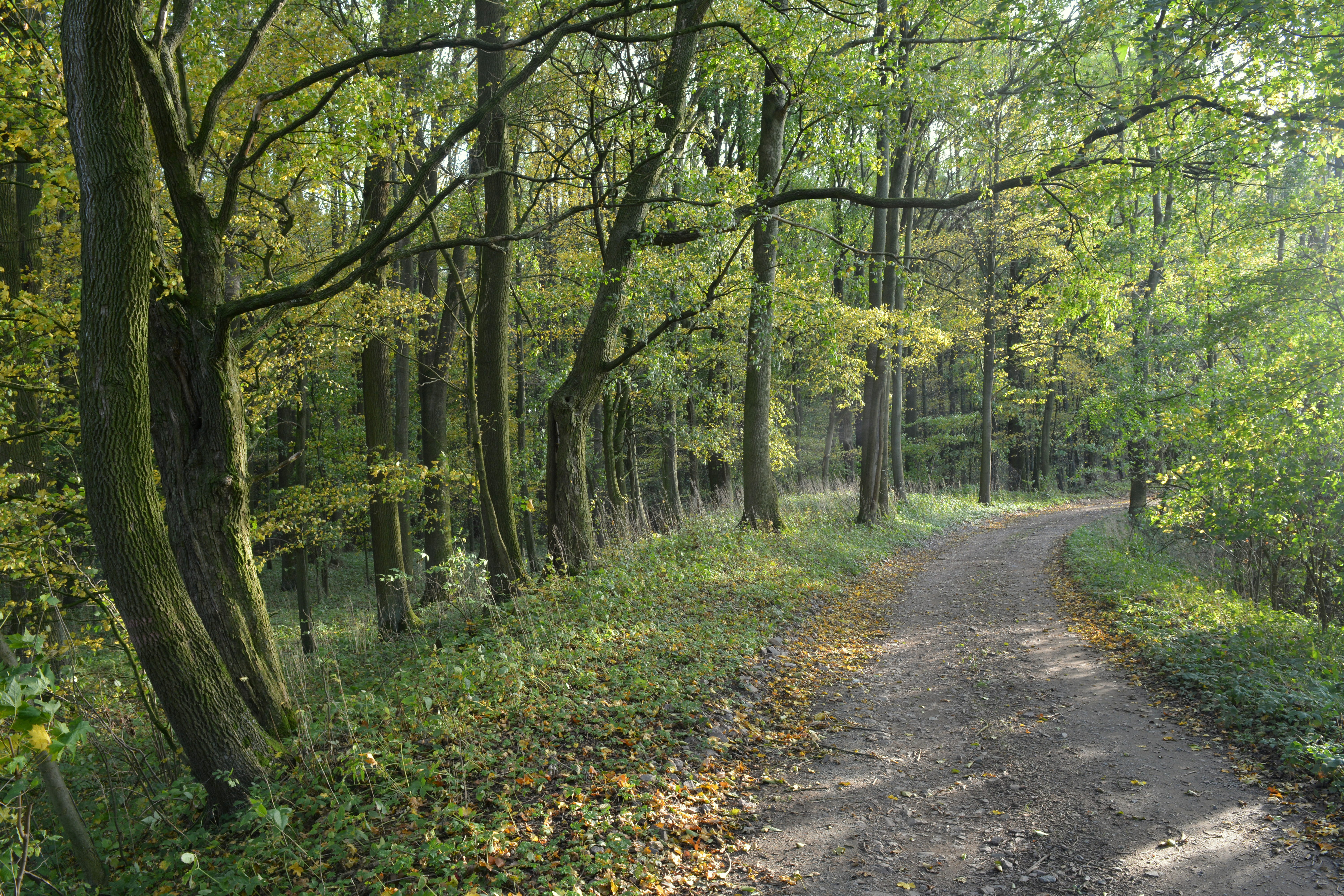 Cesta k bažantnici.